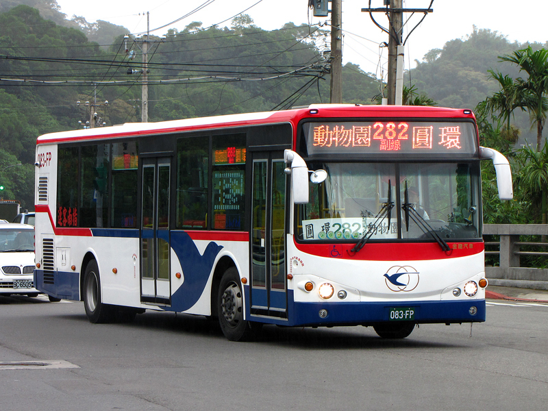 中文（台灣）: 指南客運採用的金龍KL6120U1低地板公車083-FP。